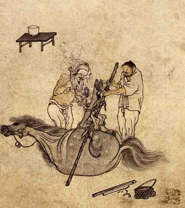 편자박기(蹄鐵), 단원풍속도첩(檀園風俗畵帖)에서 종이에담채, 27cm x 22.7cm, 국립 중앙박물관 소장